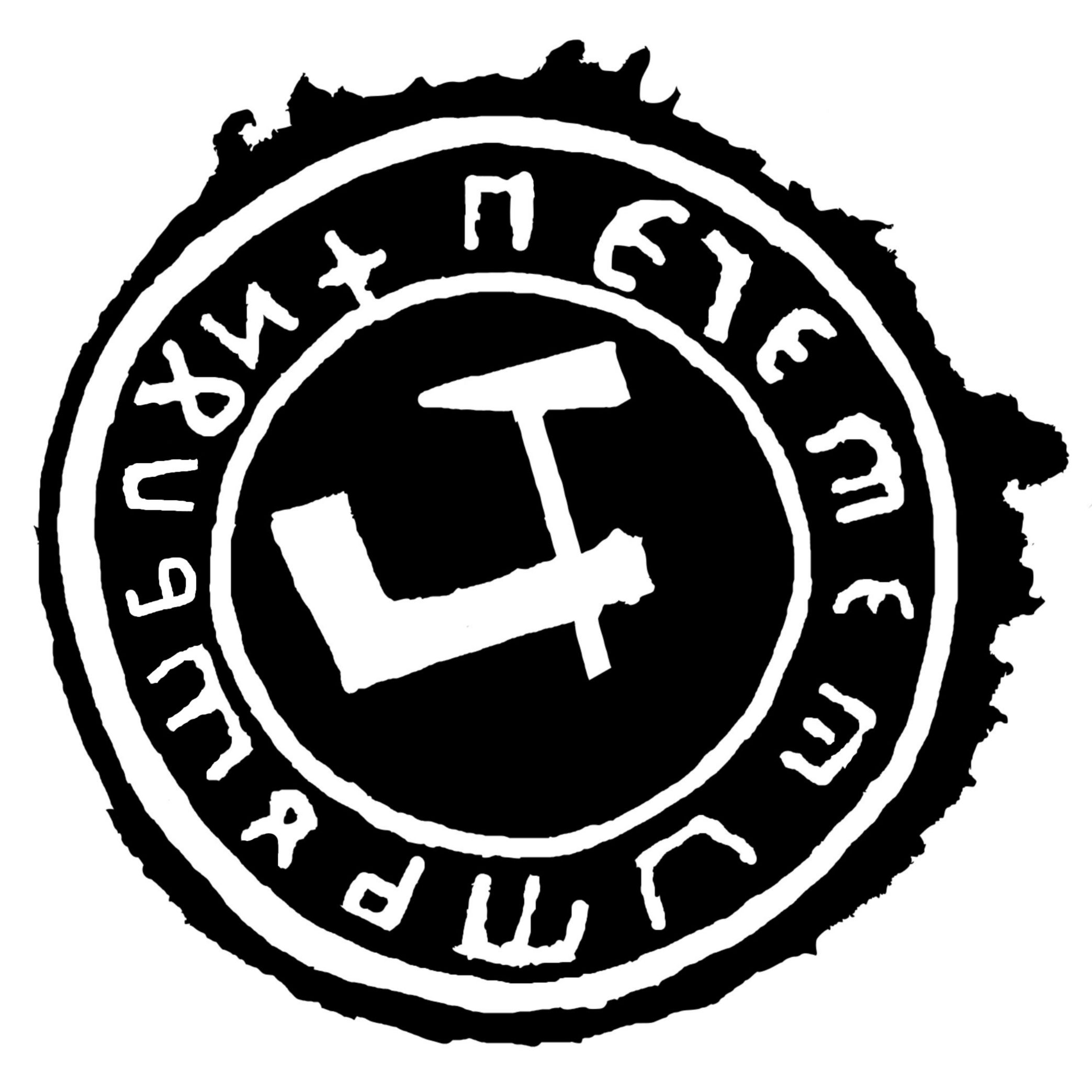 Pecetea oraşului Târgu Trotuş (la 7 februarie 1632)